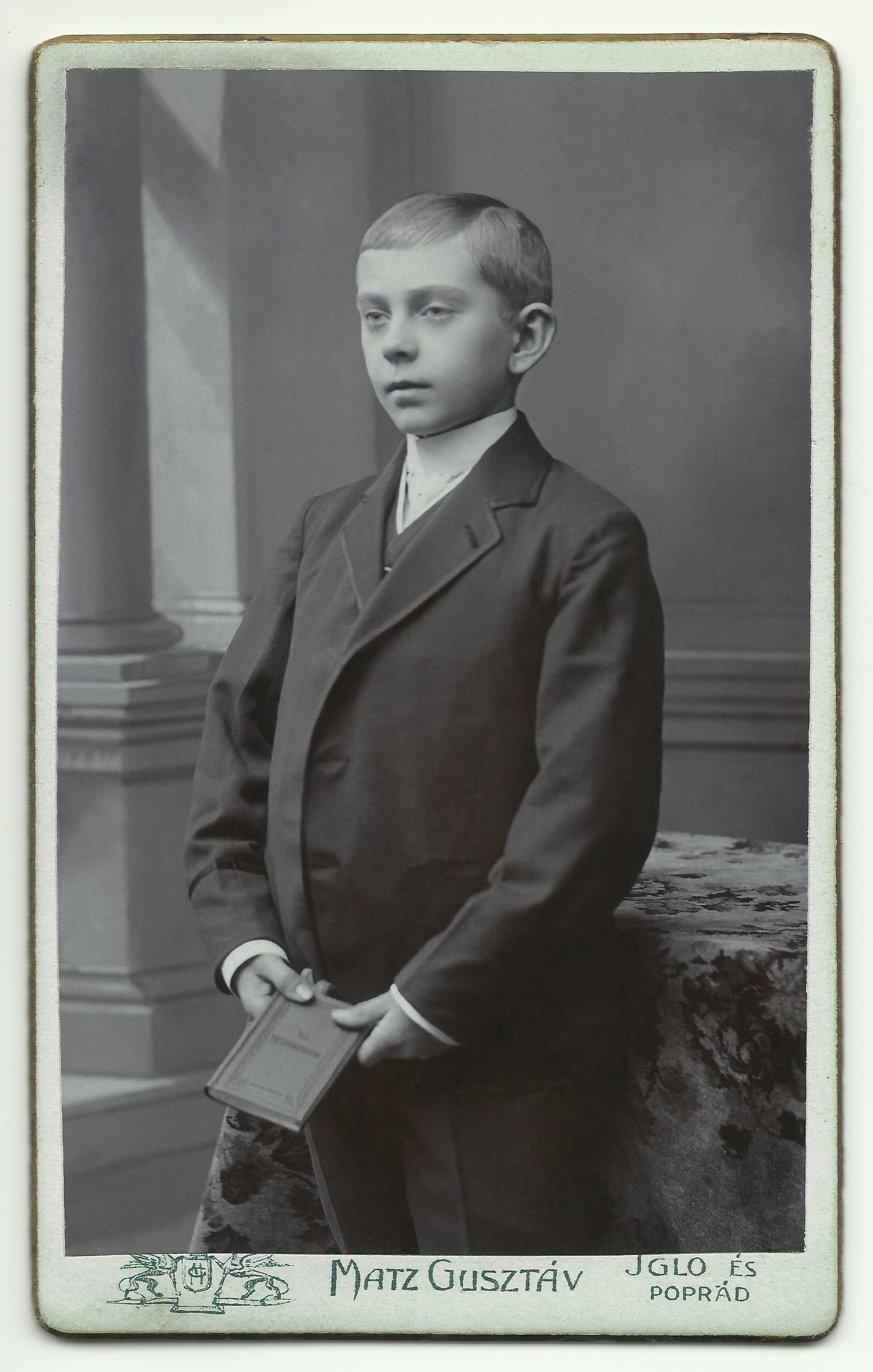 Prof. Gabriel Paulíny ako študent